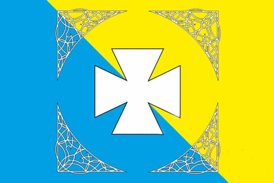 Прапор Підгаєцького району